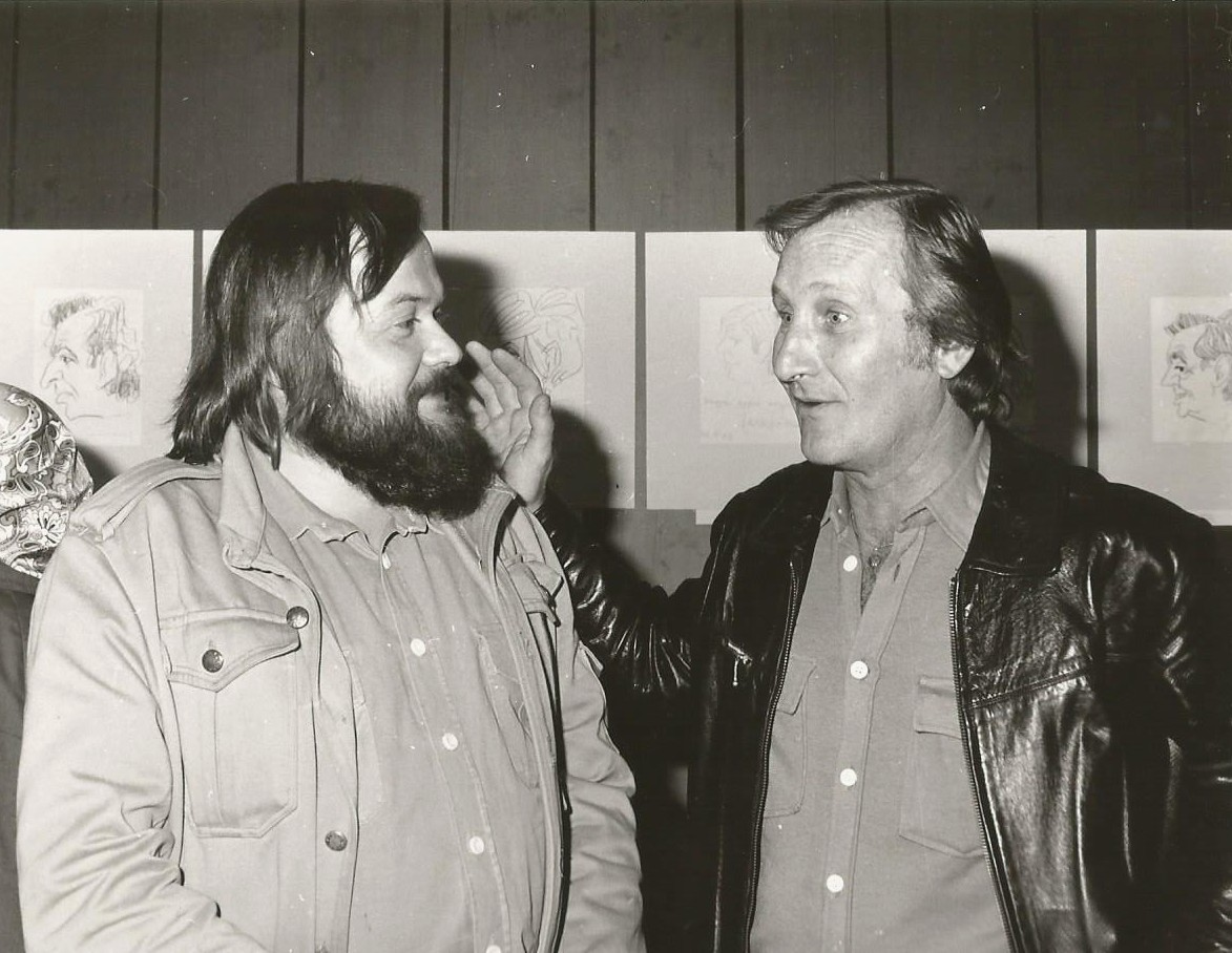 Pintér Tamás író, újságíró Váncsa István íróval, újságíróval a Népszabadság Klubban egy karikatúrakiállításon (Budapest, Blaha Lujza tér, Népszabadság Klub)